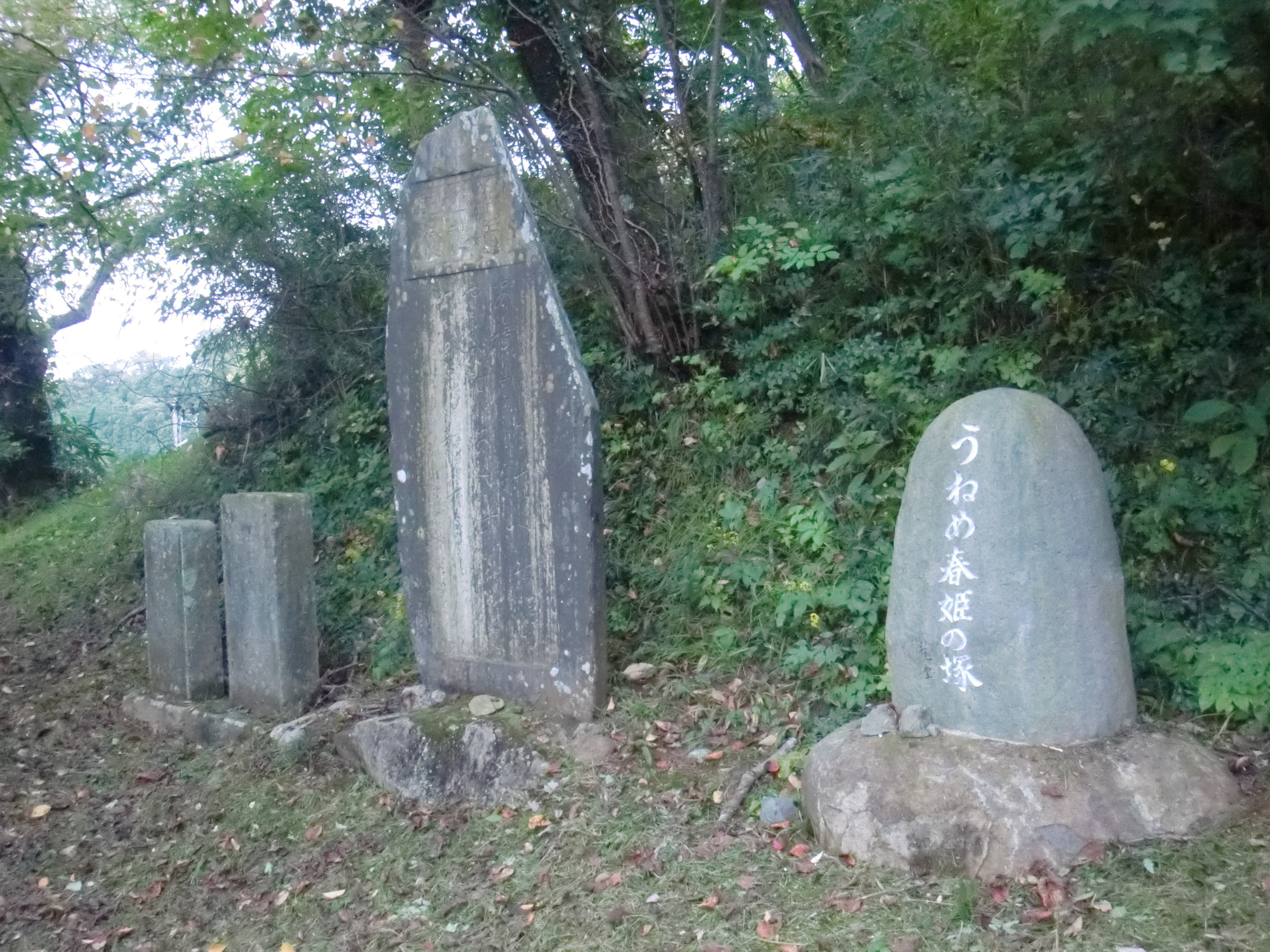 郡山市 山ノ井公園(うねめ公園) 春姫(采女伝説)の塚